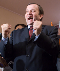 Gheorghe Flutur se bucura pentru rezultatele partidului PLD la alegerile europarlamentare.